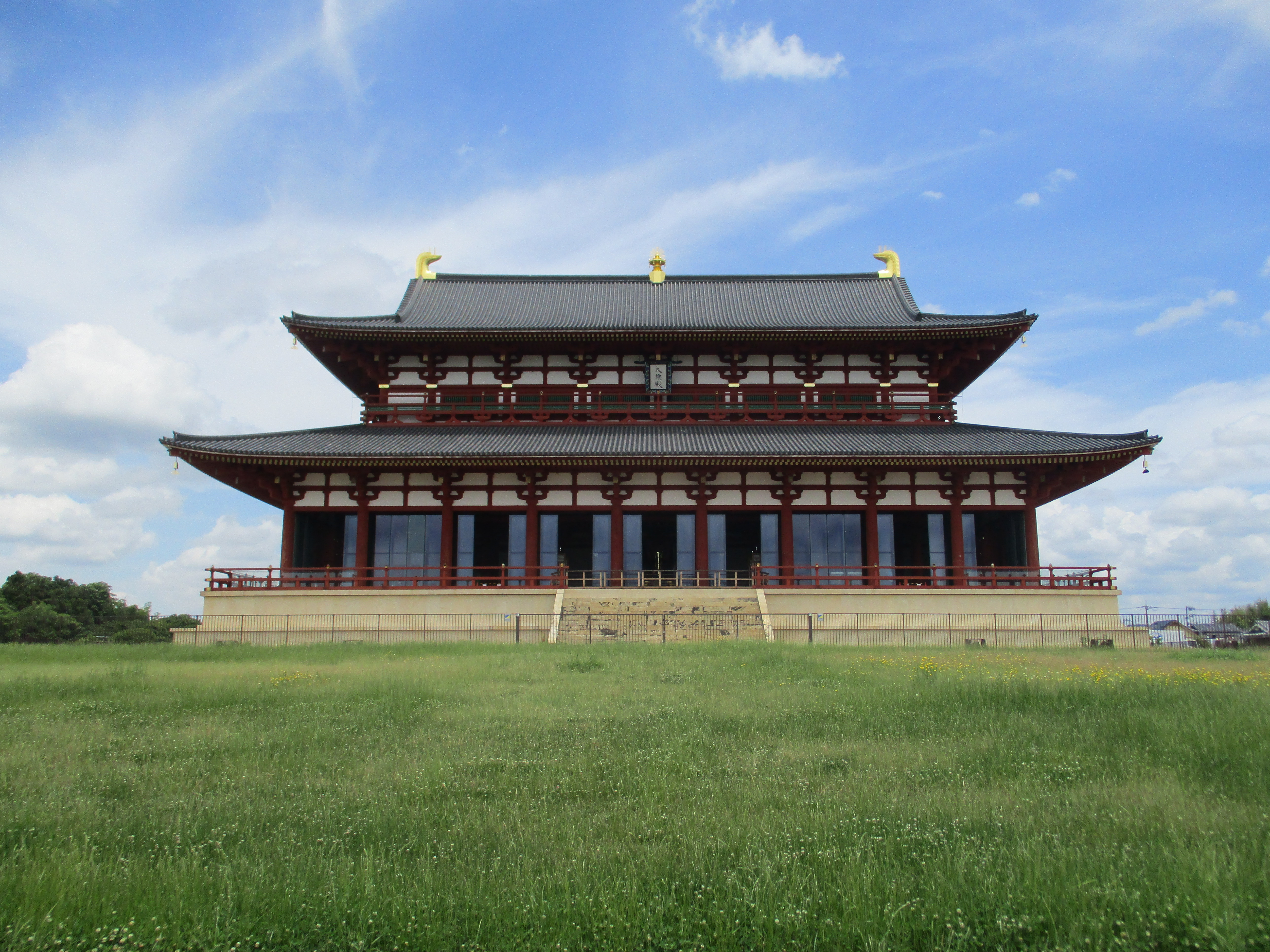 客家語/Hak-kâ-ngî: Nai-liòng Phìn-sàng-kîn Thai-khi̍t-thien （大極殿）.